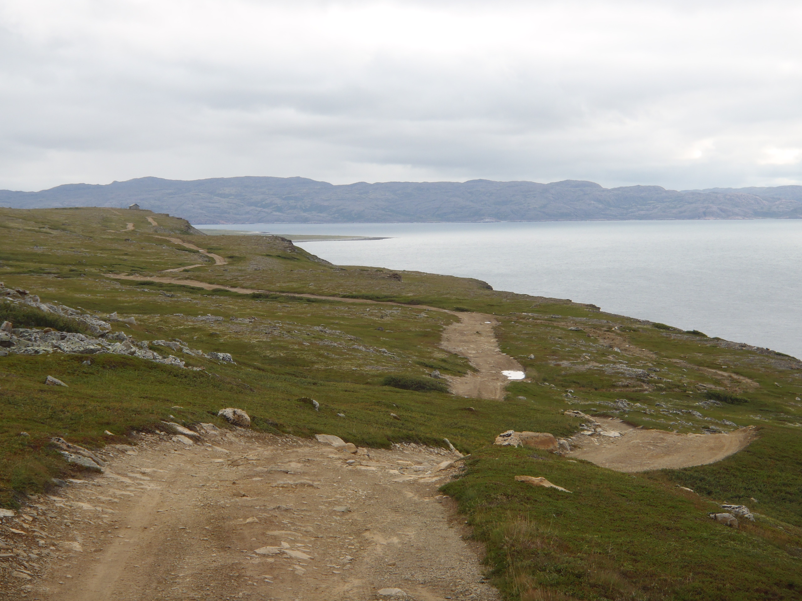 Полуостров Средний